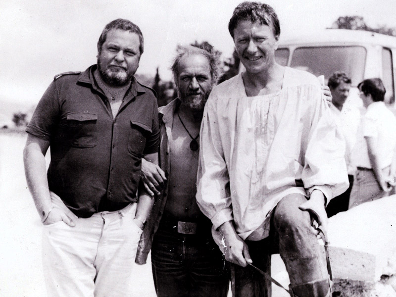 Юлиан Семенов с друзьями